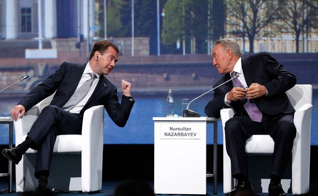 С Президентом Казахстана Нурсултаном Назарбаевым на заключительном заседании Петербургского международного экономического форума.